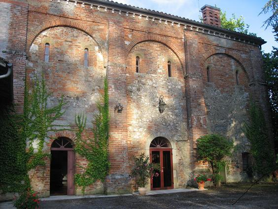 Façade Est